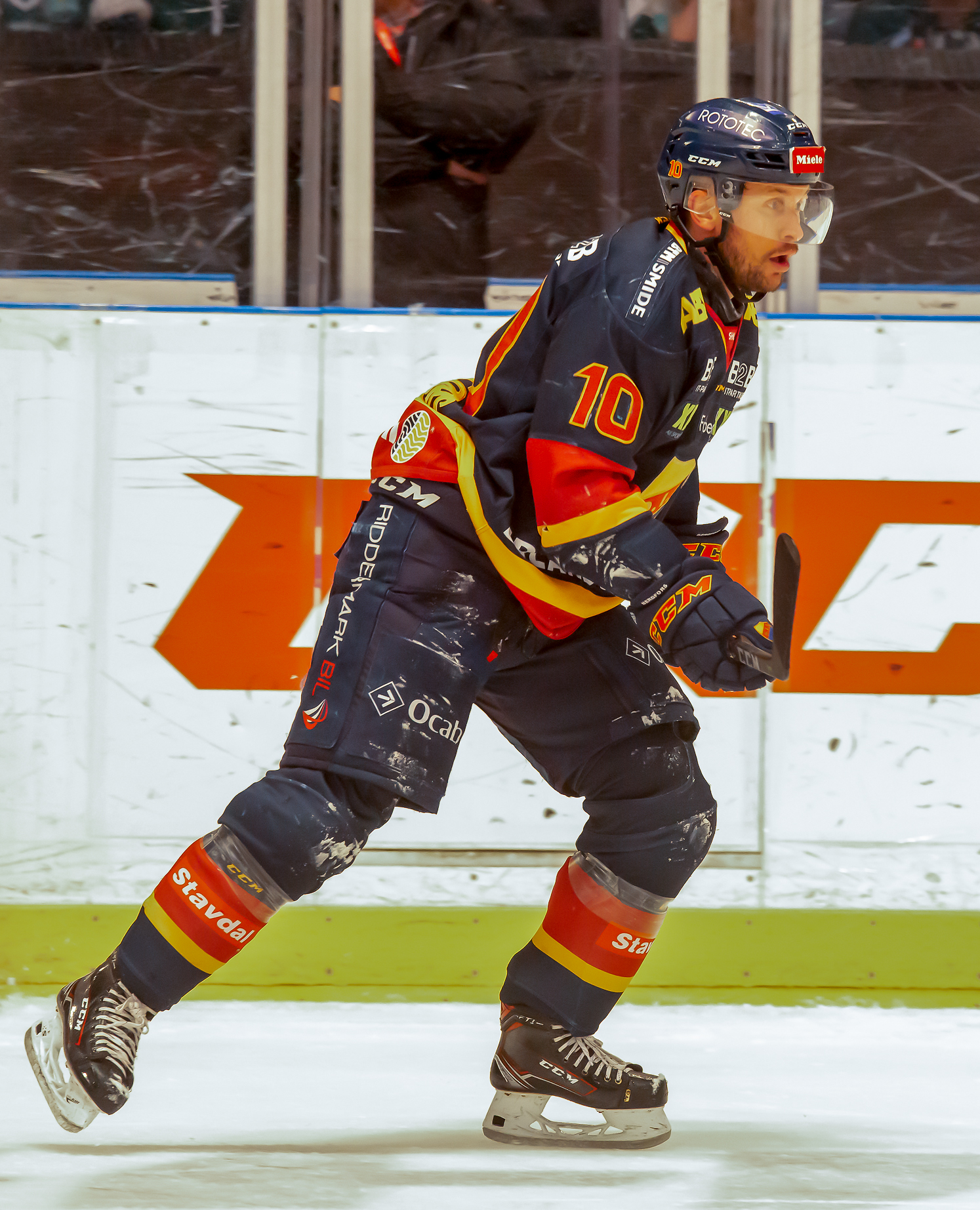 Djurgården-Färjestad 20190129